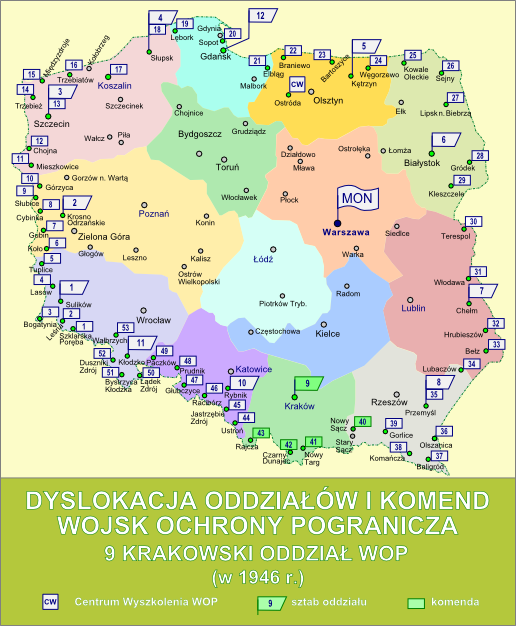 Dyslokacja oddziałów i komend Wojsk Ochrony Pogranicza w październiku 1946 r. - 9 Krakowski Oddział WOP